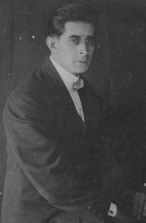 Escultor guatemalteco Rafael Yela Gunther.